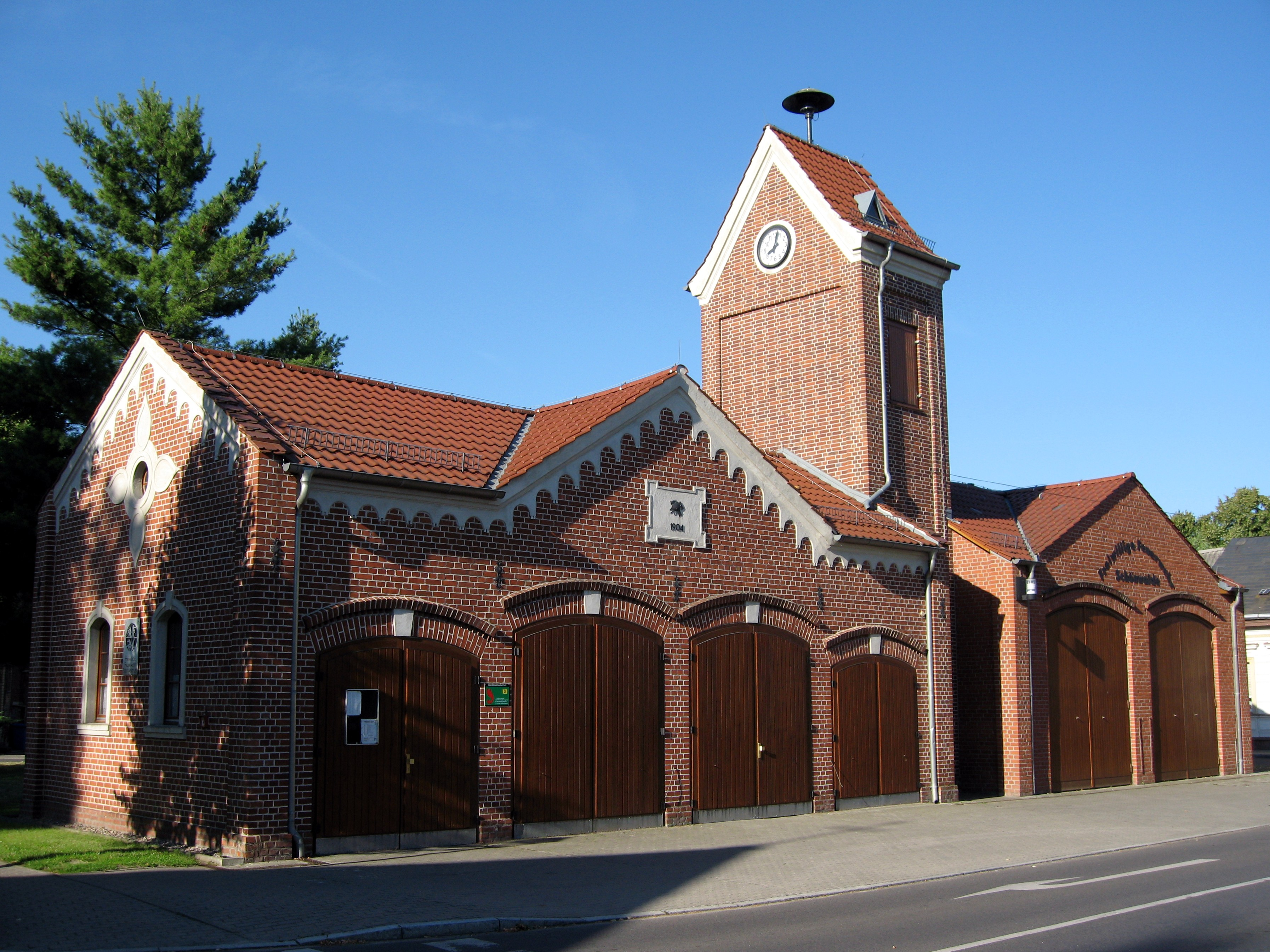 Feuerwehrgerätehaus des Ortes Schönwalde, Gemeinde Wandlitz, Landkreis Barnim, Brandenburg, Deutschland